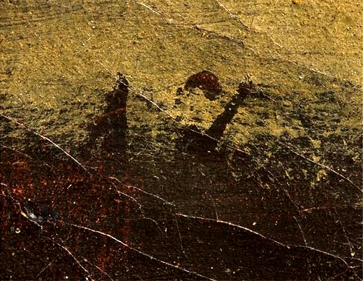 Trazos del ángulo inferior izquierdo de El Coloso, que Nigel Glendinning identificó con "17" y Manuela Mena postuló como presuntas iniciales de Asensio Juliá ("A. J.")